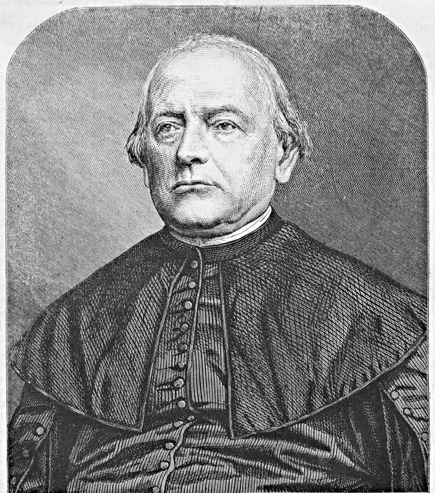 Horváth Mihály (1809–1878) politikus, miniszter, történész, püspök. Rusz Károly metszete Marastoni József rajza alapján (Vasárnapi Ujság, 1867. március 17.)